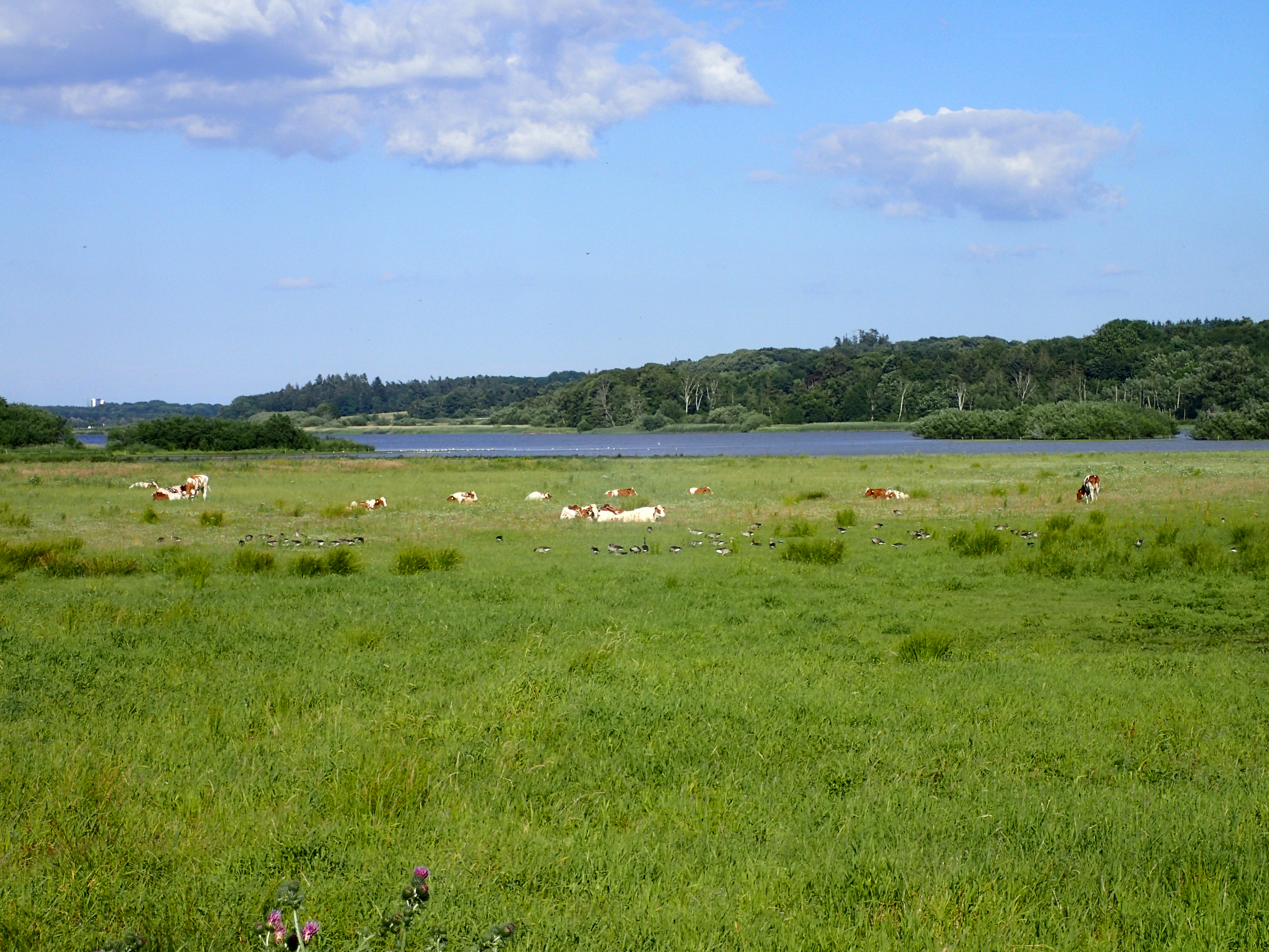 Årslev Engsø. Køer på græs ved den nordvestlige bred. (gæs)